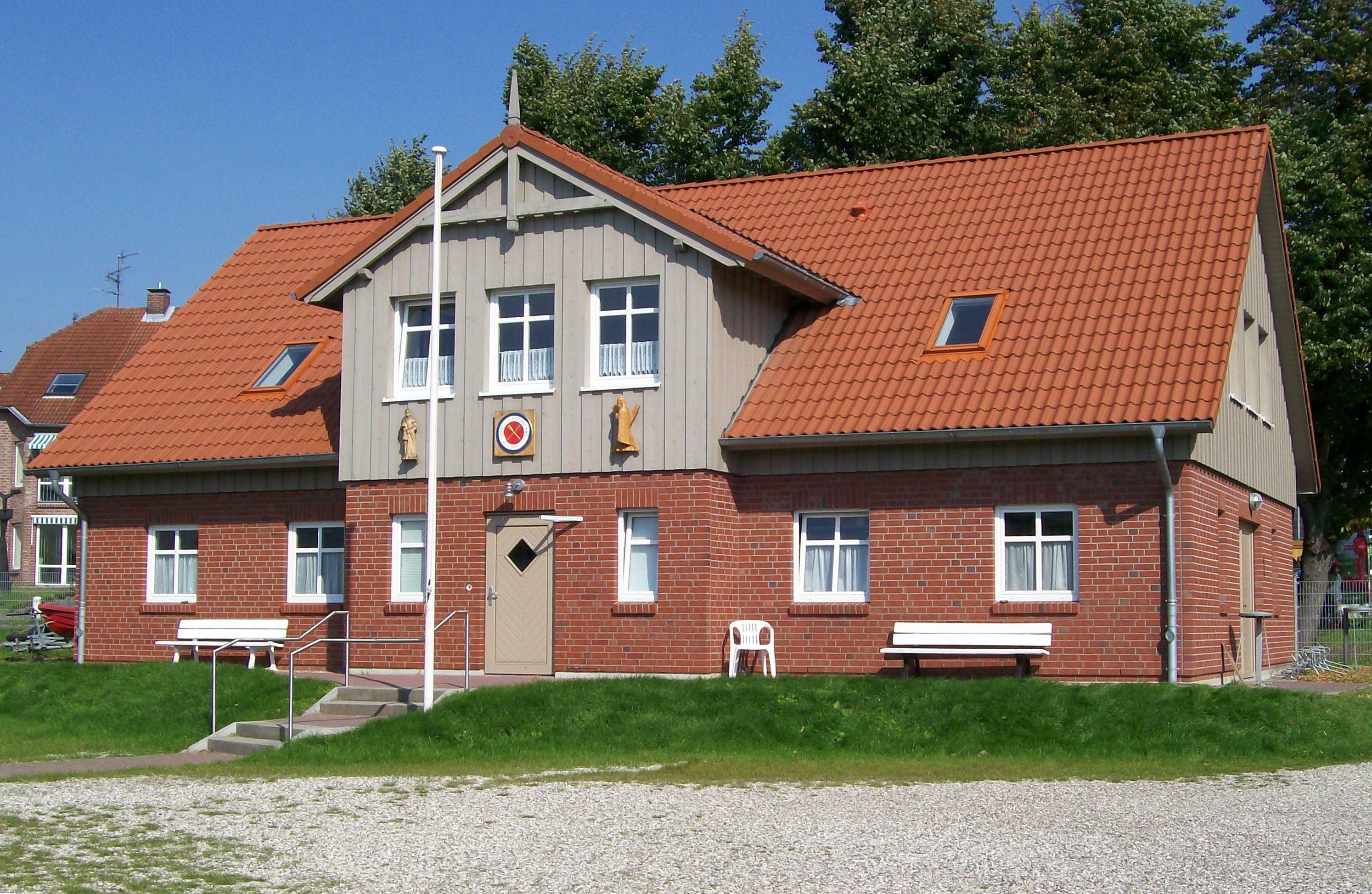 Fischereimuseum in Neustadt in Holstein, Gebäude des Fischeramts von 1474 am Neustädter Hafen